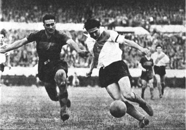 Angel Labruna jugando un partido para River Plate ante Boca Juniors.